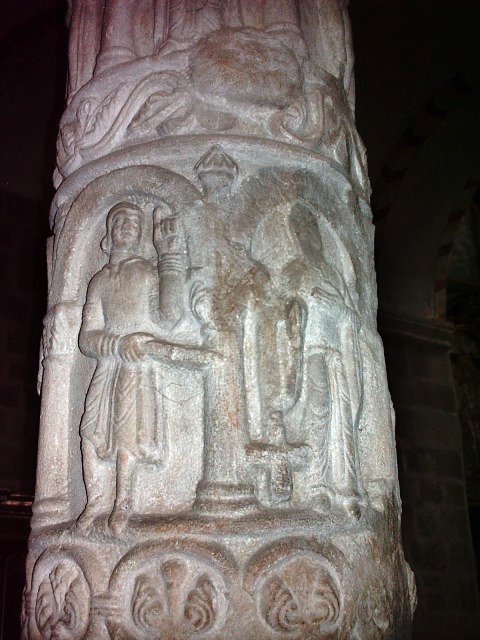 Kościół Świętej Trójcy i Najświętszej Marii Panny w Strzelnie - kolumna przywar